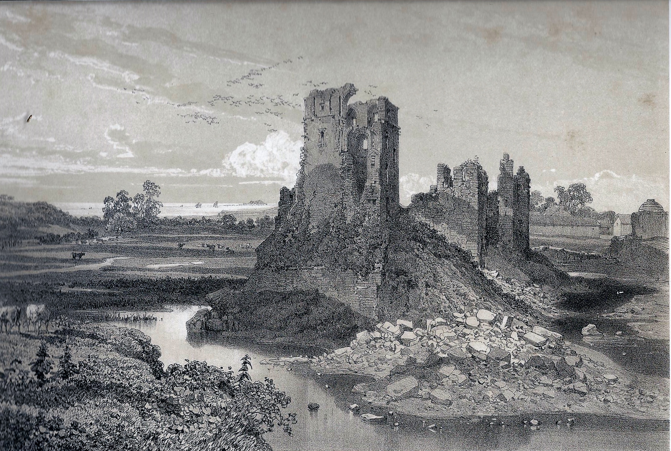 "Ruines du château de Trémazan, près de Ploudalmézeau" (Félix Benoist, "La Bretagne contemporaine", tome "Finistère", 1867).